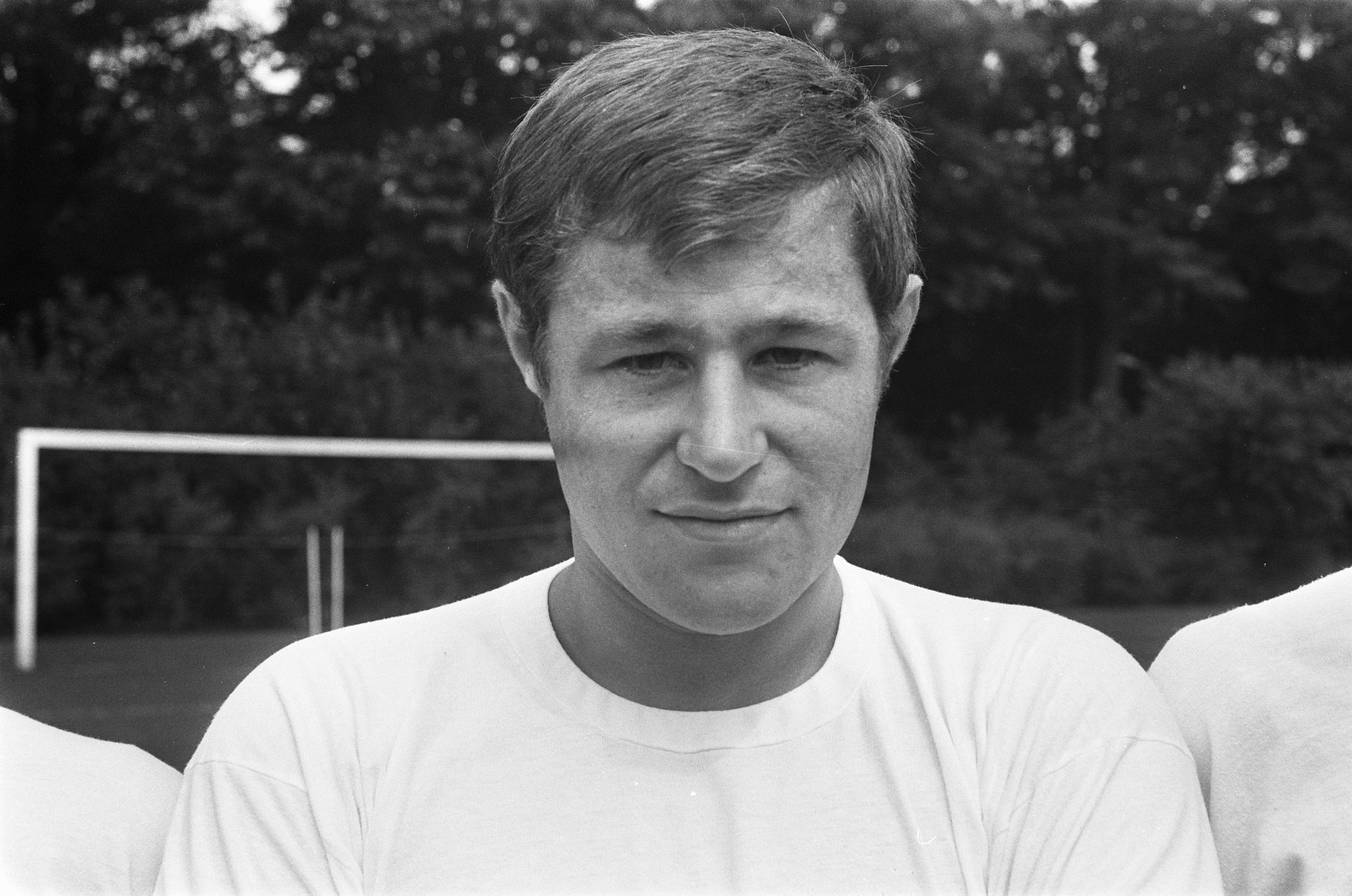 Collectie / Archief : Fotocollectie Anefo Reportage / Serie : Voetballers Nederlands elftal Beschrijving : Rinus Israel Annotatie : Randnummers negatiefstrook nr. 11 - Rinus Israel; Datum : 11 augustus 1968 Trefwoorden : portretten, voetballers Persoonsnaam : Israel, Rinus Fotograaf : Jac. de Nijs / Anefo Auteursrechthebbende : Nationaal Archief Materiaalsoort : Negatief (zwart/wit) Nummer archiefinventaris : bekijk toegang 2.24.01.05 Bestanddeelnummer : 921-5884